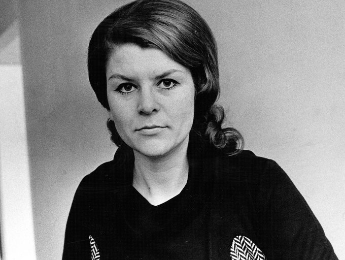 Clary Jansson, svensk TV-journalist. Foto från 1965 (Aftonbladets bildarkiv).